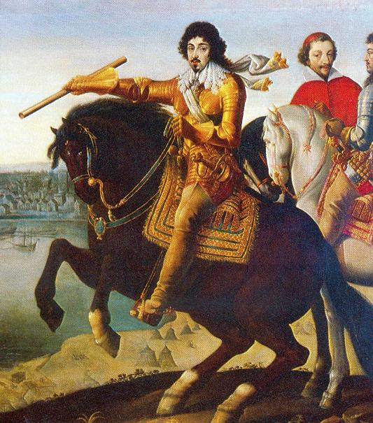 Louis XIII et le cardinal de Richelieu devant La Rochelle